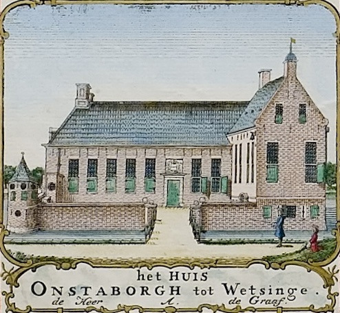 Onstaborg in Wetsinge. Uitsnede uit de kaart van Theodorus Beckeringh uit 1781